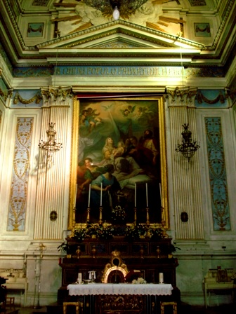 claudio zisa, abside della chiesa di S. Maria la Nova di Venanzio Marvuglia, pubblico dominio